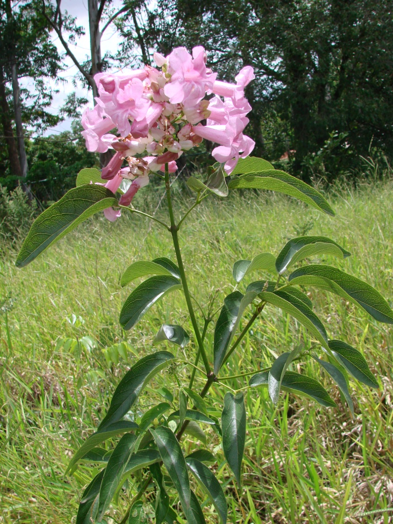 Cuspidaria sceptrum (Cham.) L.G. Lohmann - Sin: Arrabidaea sceptrum - BIGNONIACEAE - Parque Olhos D'Água - Brasília - Distrito Federal - Brasil.